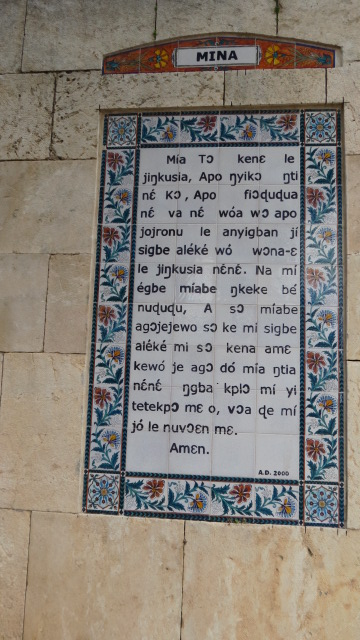 Church of the Pater Noster, Mount of Olives, Jerusalem כנסיית אבינו שבשמים Sanctuary of the Eleona